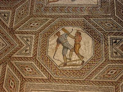 foto: W.thiel *aufgen: August 2003